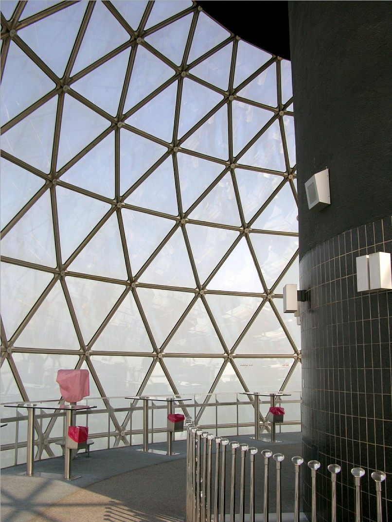 Inside Kuwait towers